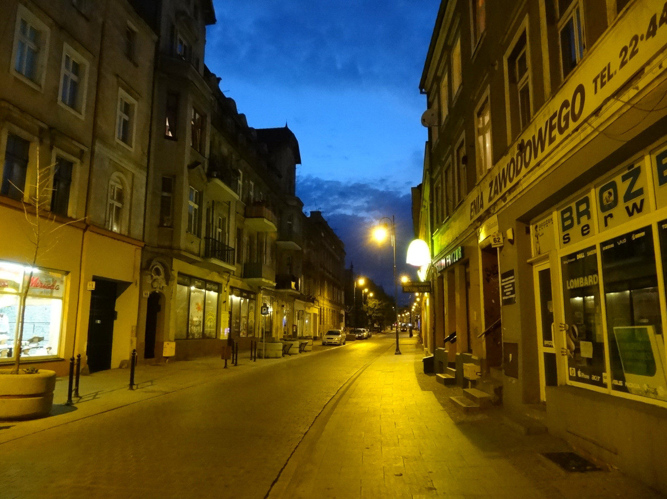 Ulica Dworcowa w Bydgoszczy